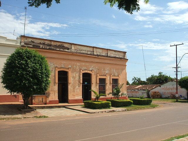 Casona